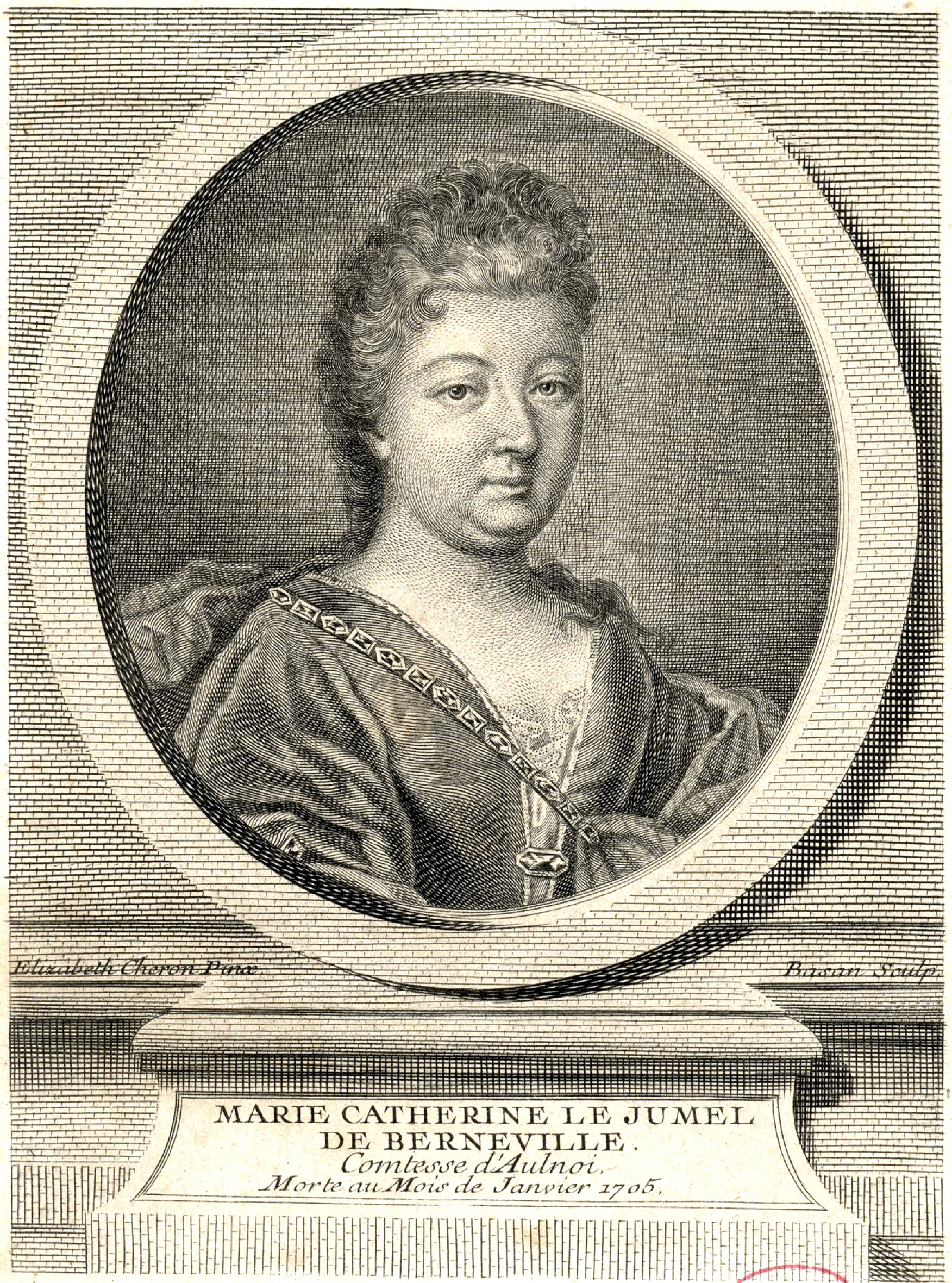 Porträt Marie-Catherine Le Jumel de Barnevilles, comtesse d'Aulnoy